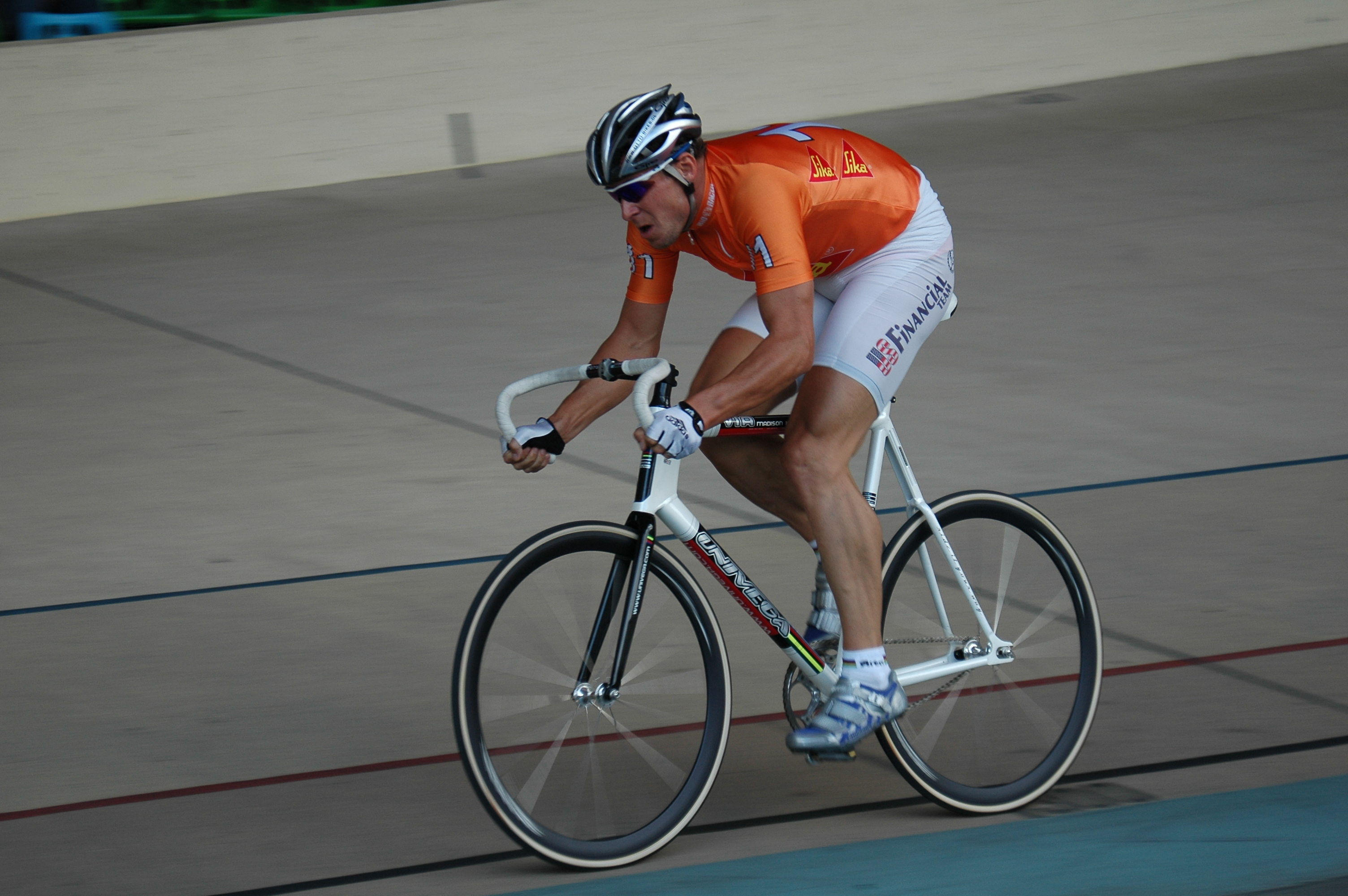 Robert Bartko